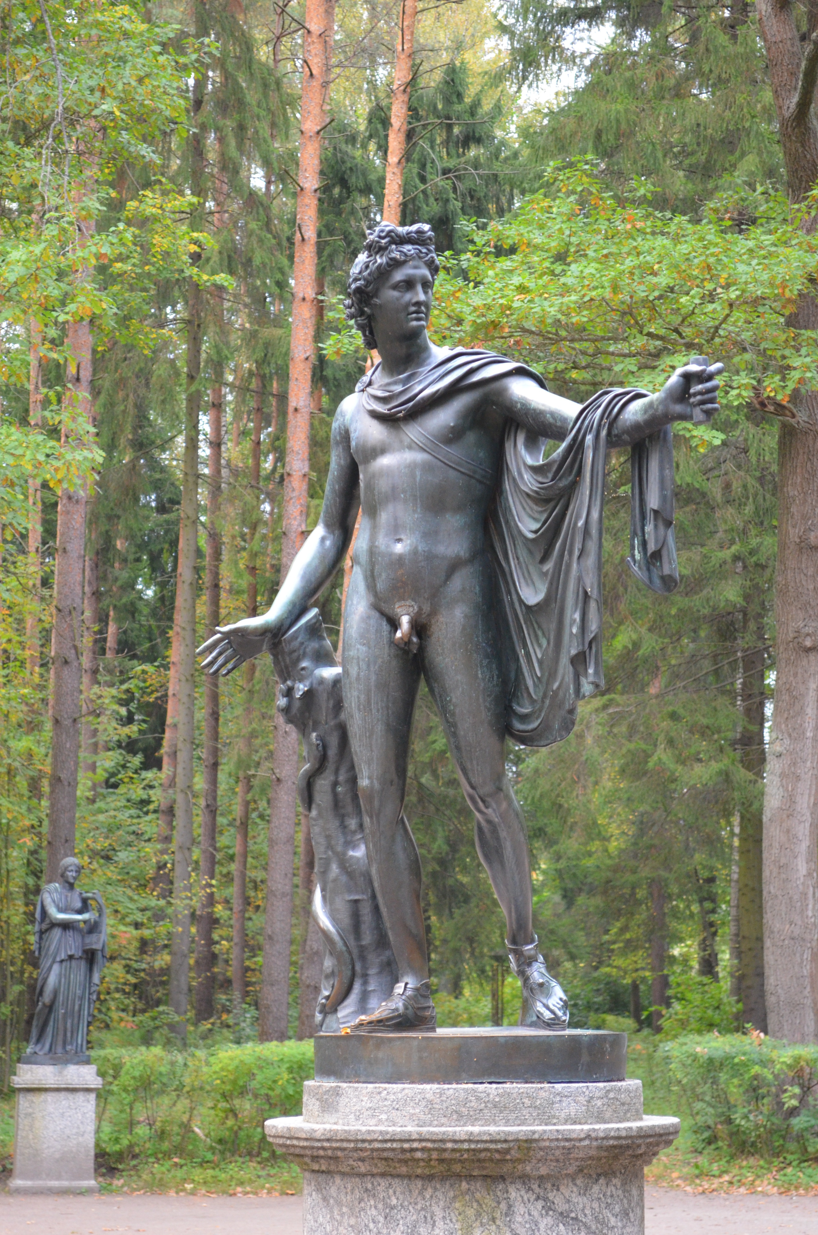 Статуя "Аполлон Бельведерский" 1782 г. (с оригинала ск.Леохара) , отливка Гастклу Э. по модели Гордеева Ф., 1963 г. (воссоздание постамента)